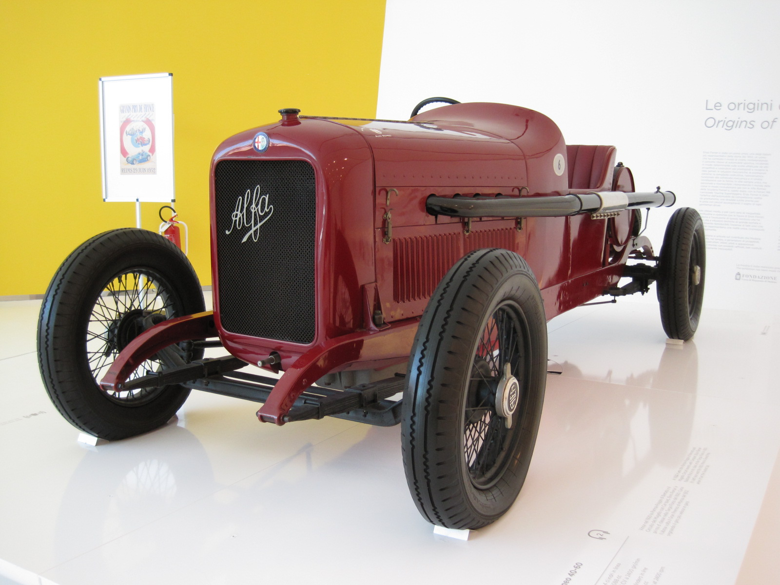 Automobiles in Enzo Ferrari Museum in Modène - Alfa Roméo 40-60 / 1914